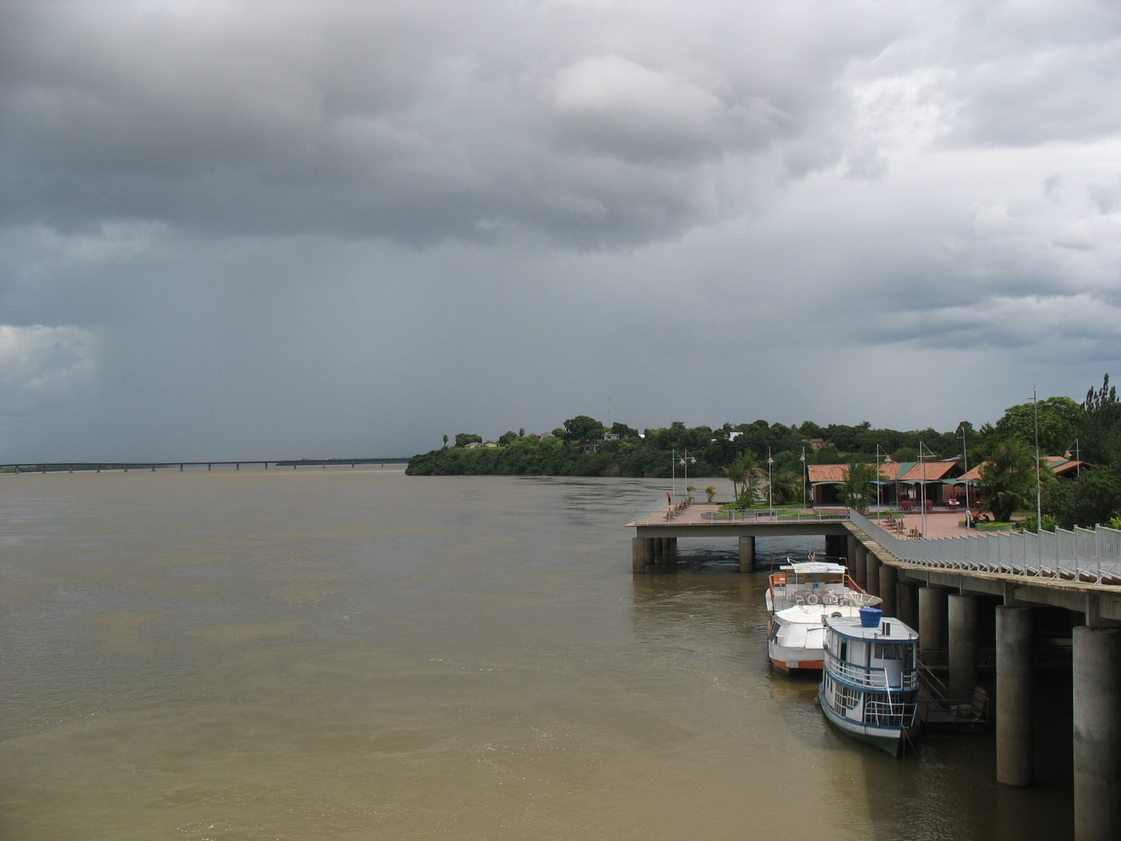 21 de julho de 2009: vista bacana do Rio Branco a partir do pier, atra��o tur�stica da capital de Roraima